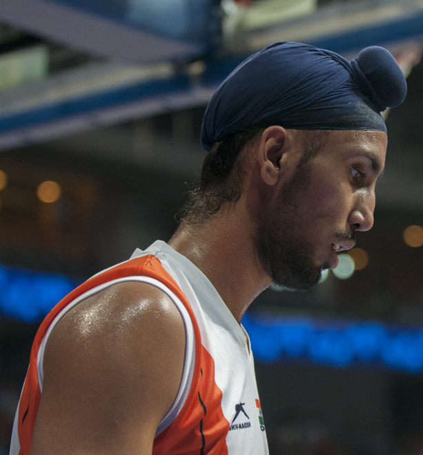 Amjyot Singh